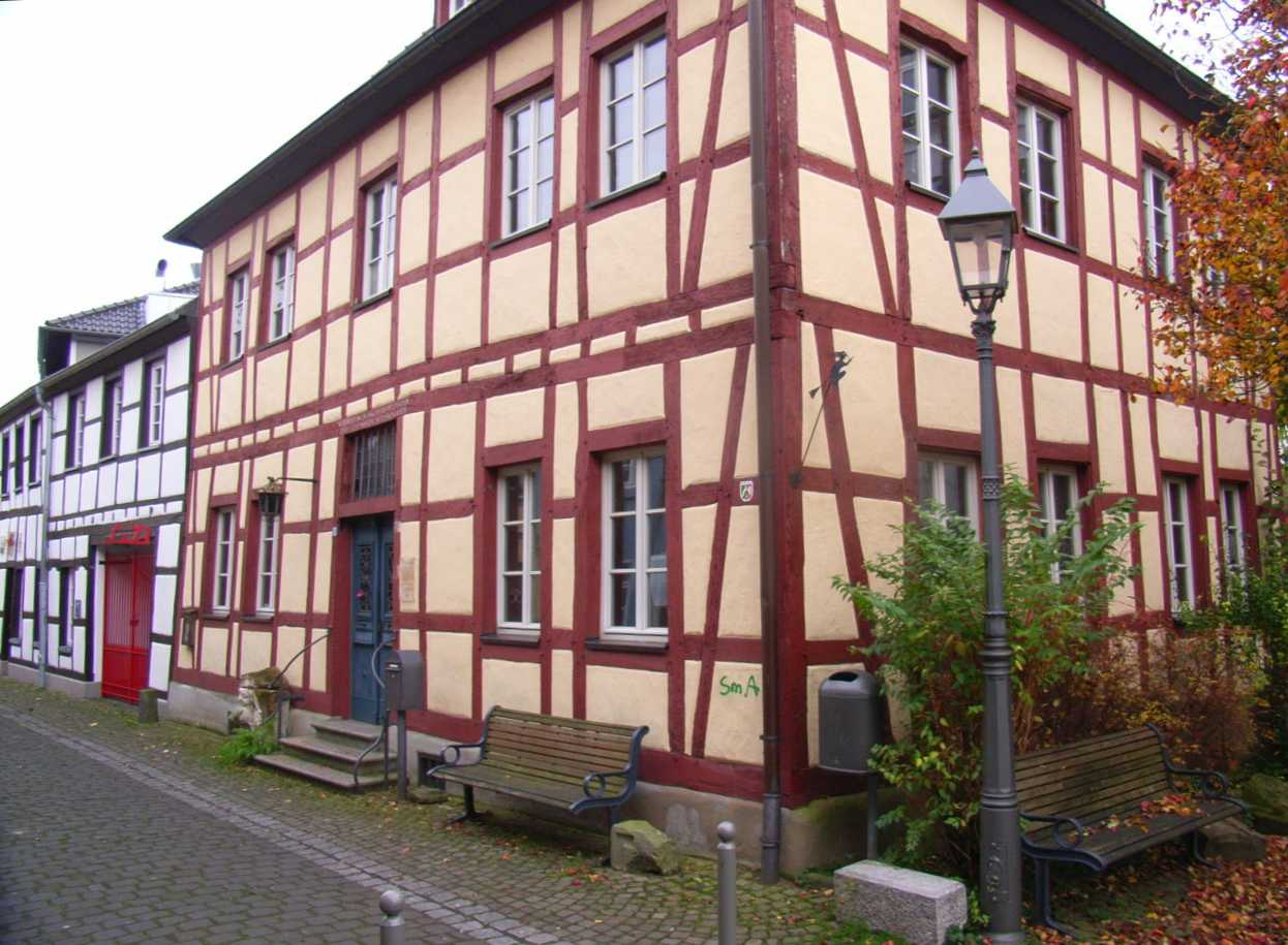 Museum für Alltagsgeschichte, Kempishofstraße 15, Brühl (Rheinland), NRW